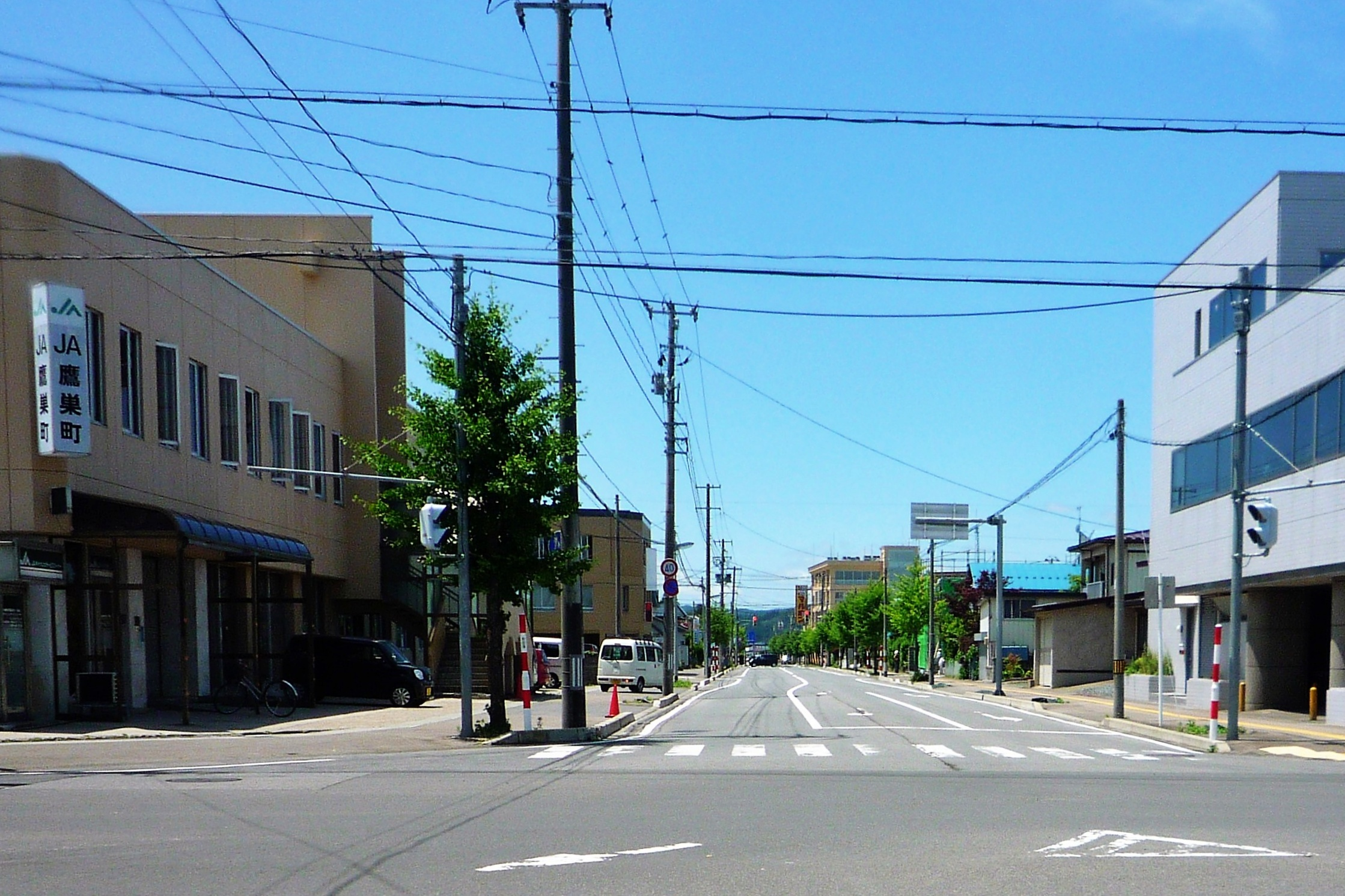 秋田県道24号鷹巣川井堂川線 大町1丁目交差点（東中岱方向）